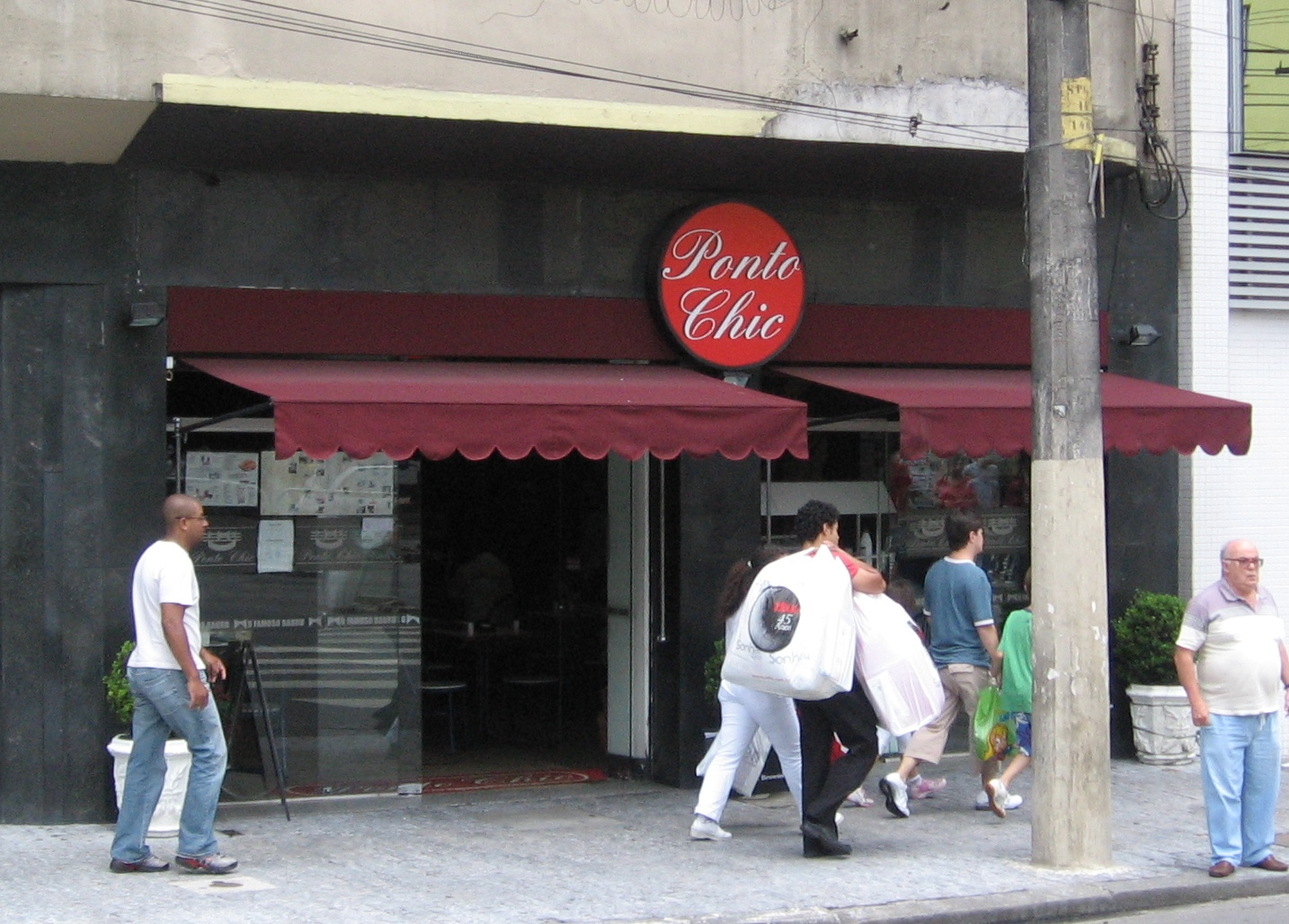 Restaurante Ponto Chic, onde foi criado o Bauru (nota: esta é a loja do Paraíso, não a do Paissandu)